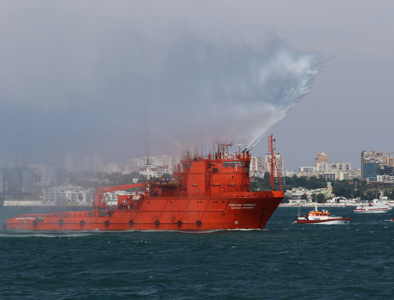 Рятувальний корабель «Олександр Охрименко» — багатоцільовий аварійно-рятувальний корабель ВМС України.